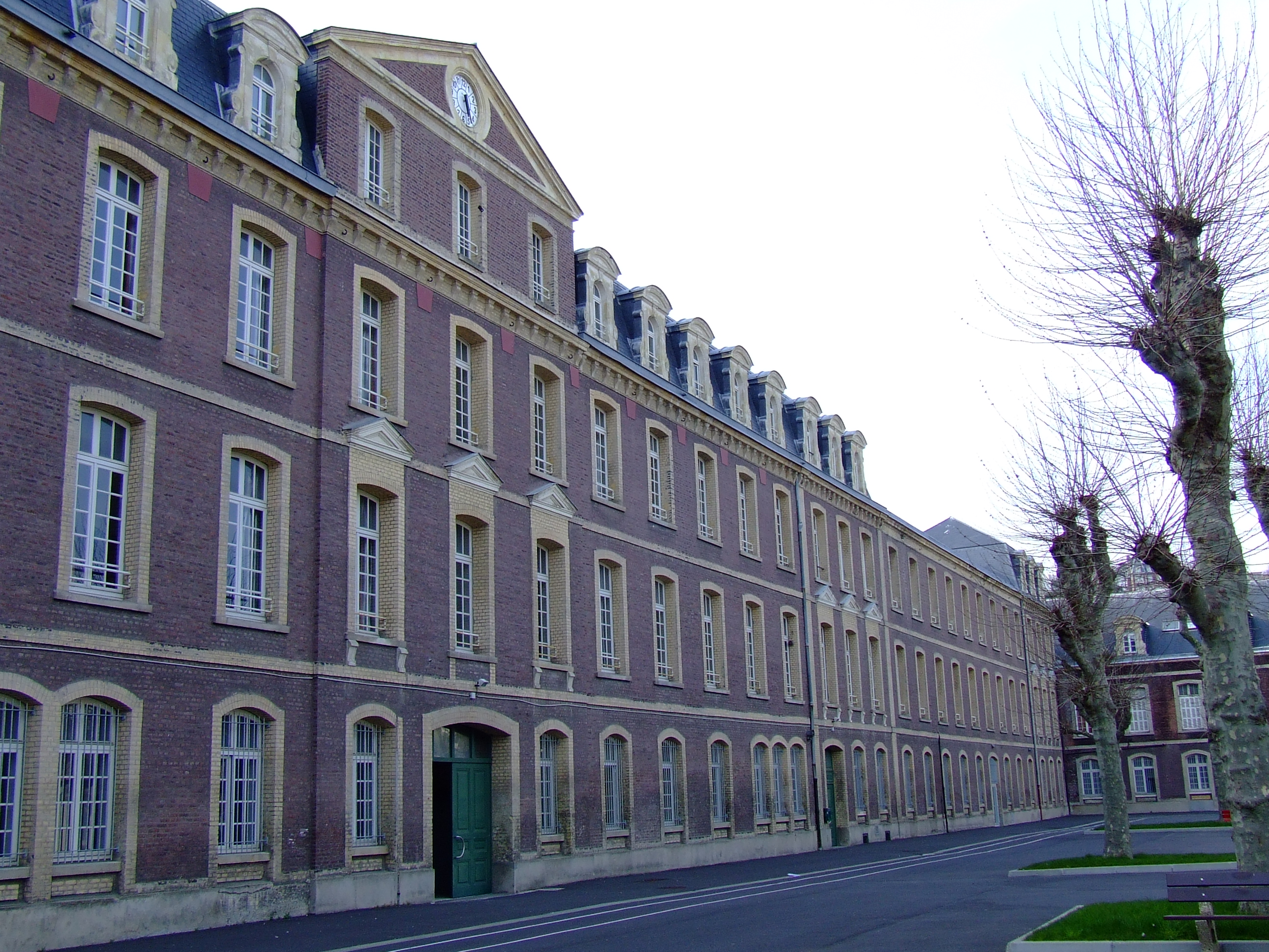 Cours Just Viel